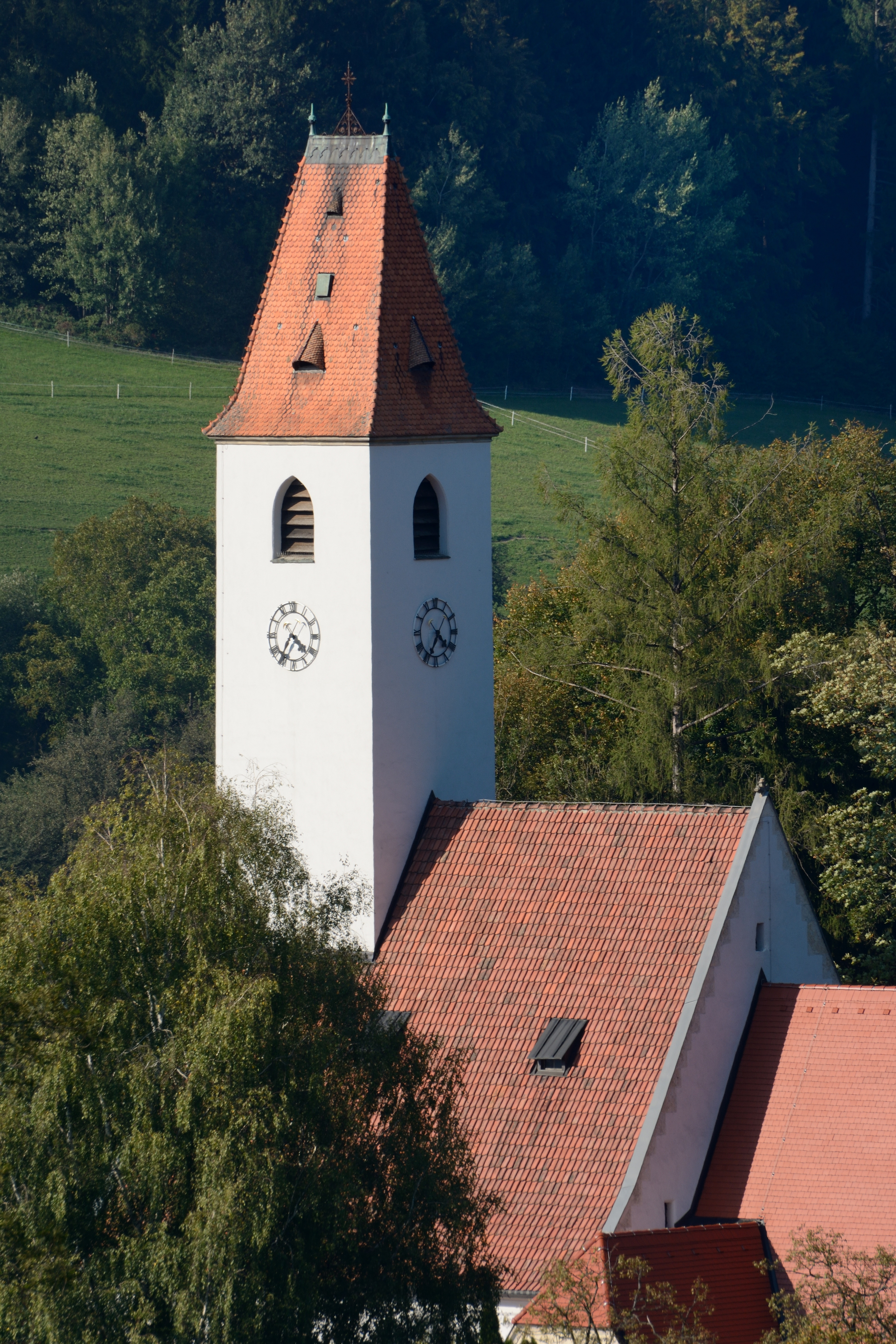 Kath. Pfarrkirche hl. Florian, Aspang-Markt